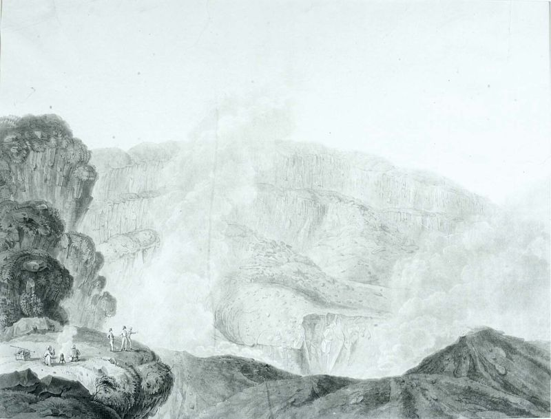 Litho. Vermoedelijk een litho naar een werk van A. J. Bik.. Gunung Gedeh